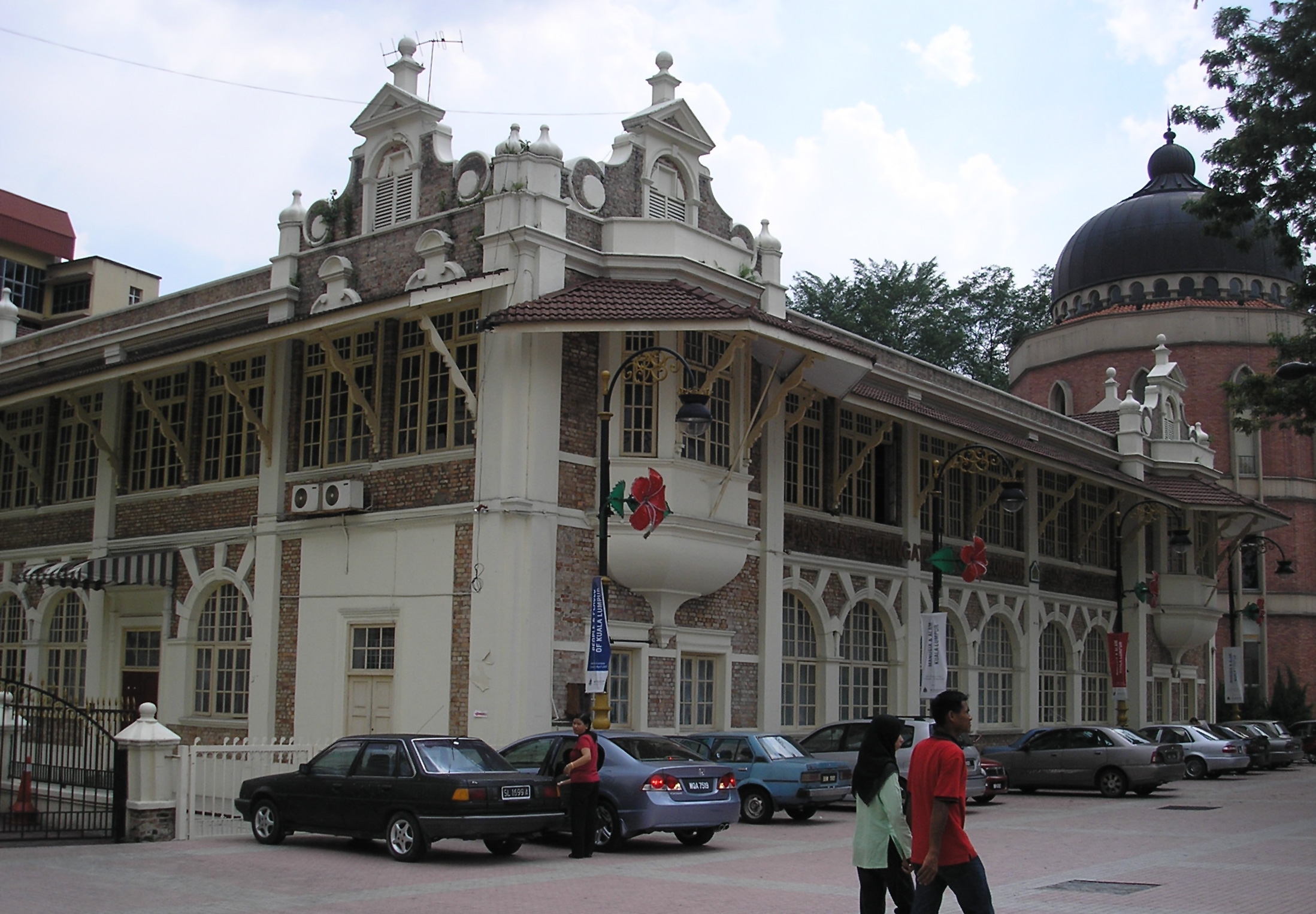 The Memorial Library, Merdeka Square, Kuala Lumpur, Malaysia.